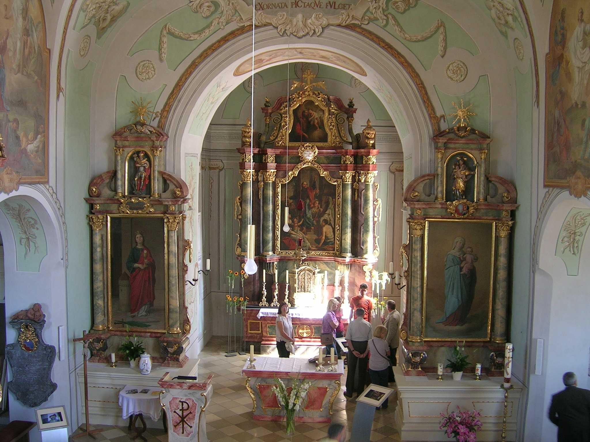 Pfarrkirche Hörgertshausen: Führung Denkmaltag 2012This is a photograph of an architectural monument.